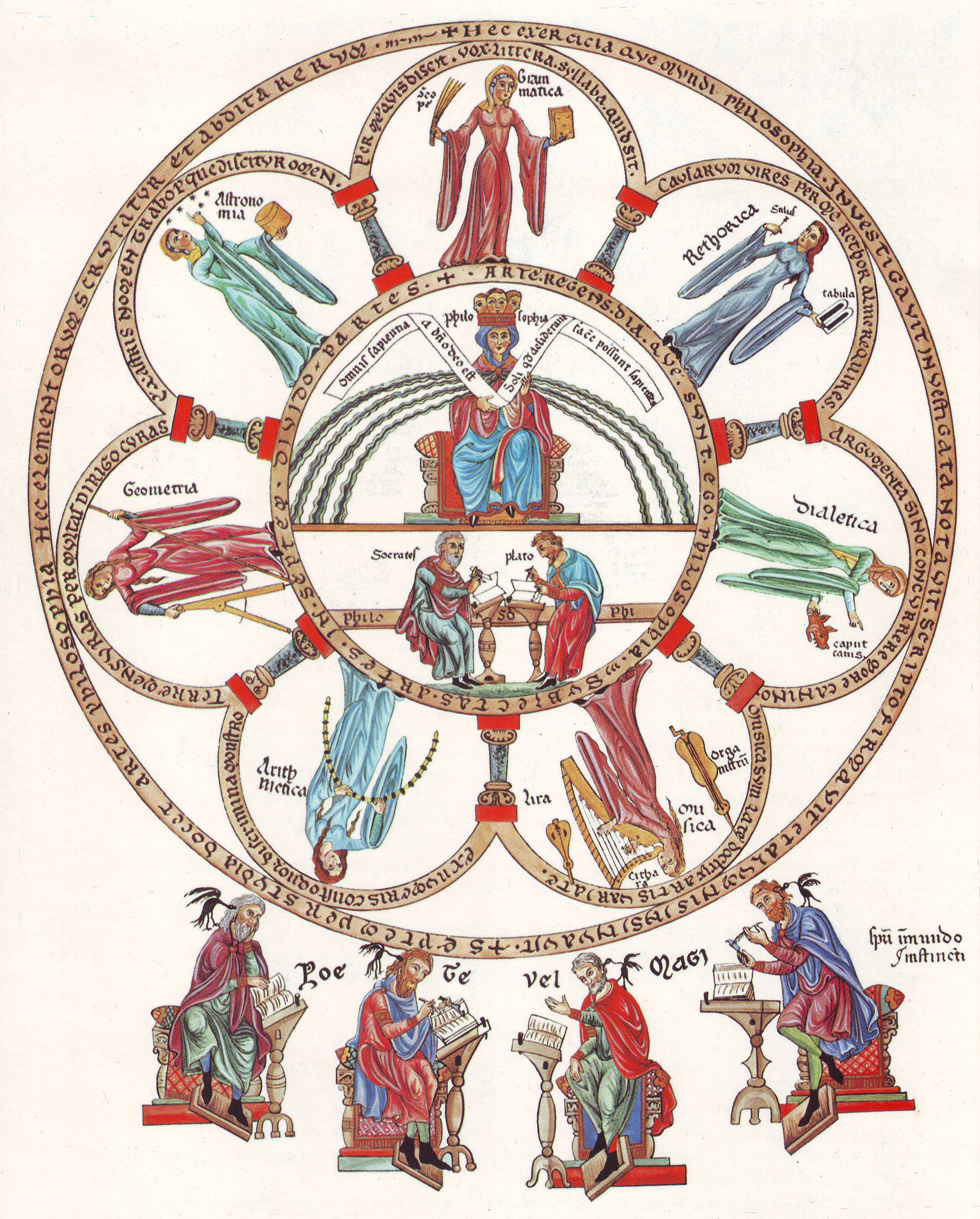 Die Philosophie thront inmitten der Sieben Freien Künste. Septem artes liberales aus dem Hortus deliciarum der Äbtissin Herradis Landsbergensis oder Herrad von Landsberg.